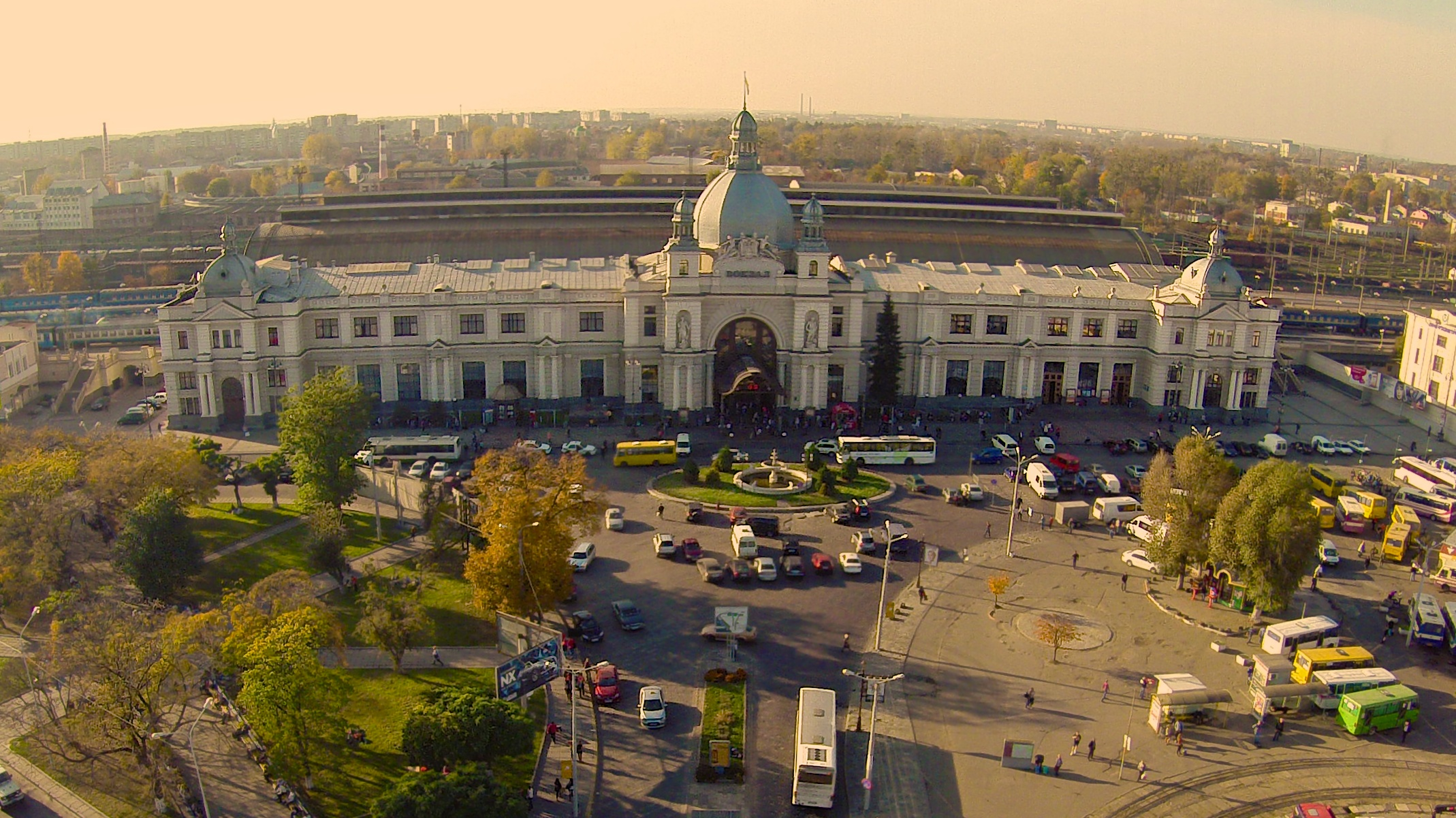 зал. двірець, Львів, Двірцева пл.